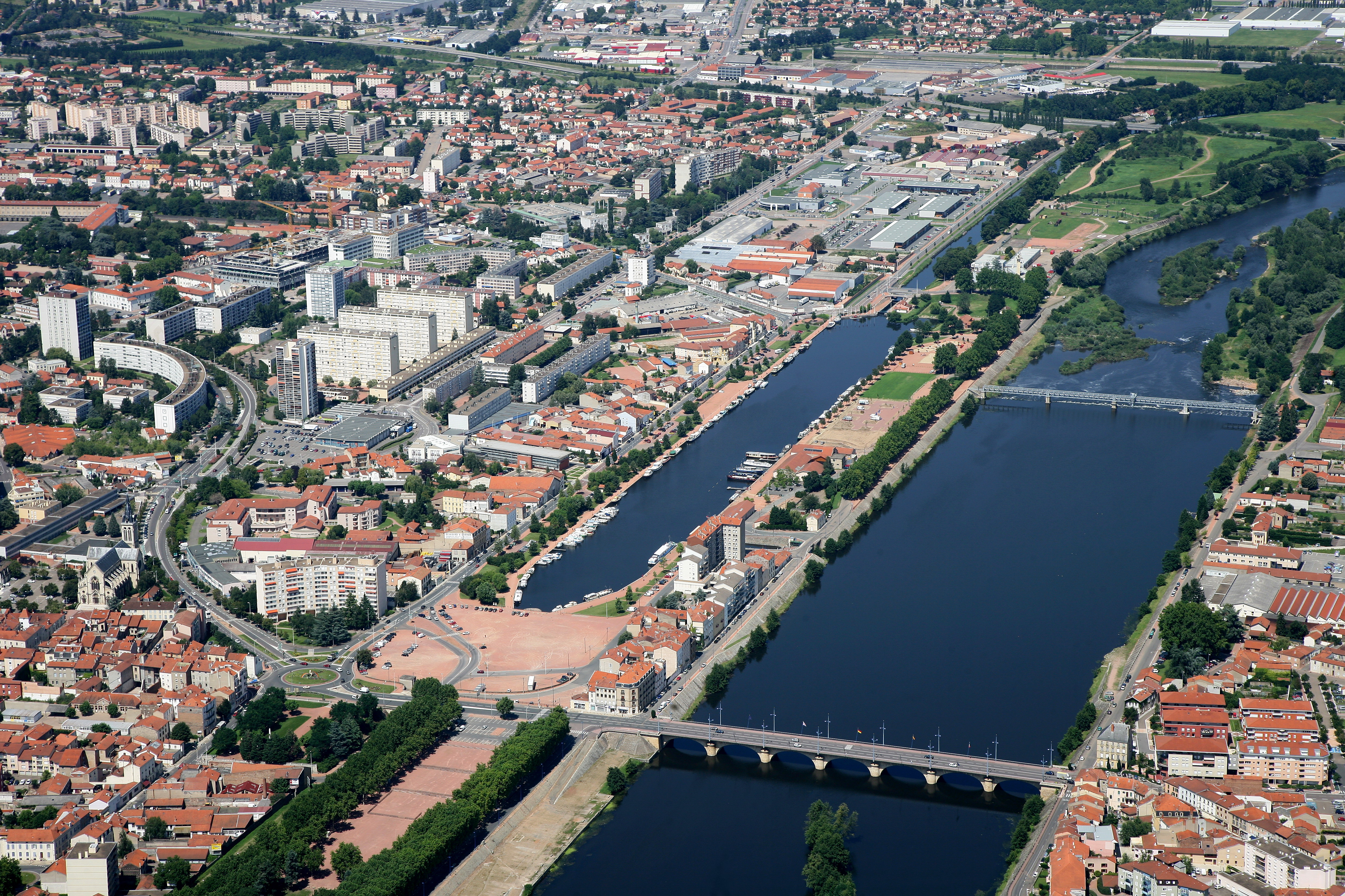 Une vue de l'entrée de Roanne